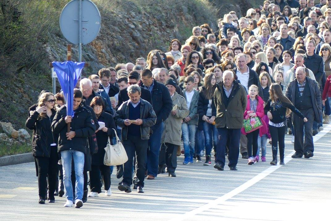 Kantanje na Veliki petak